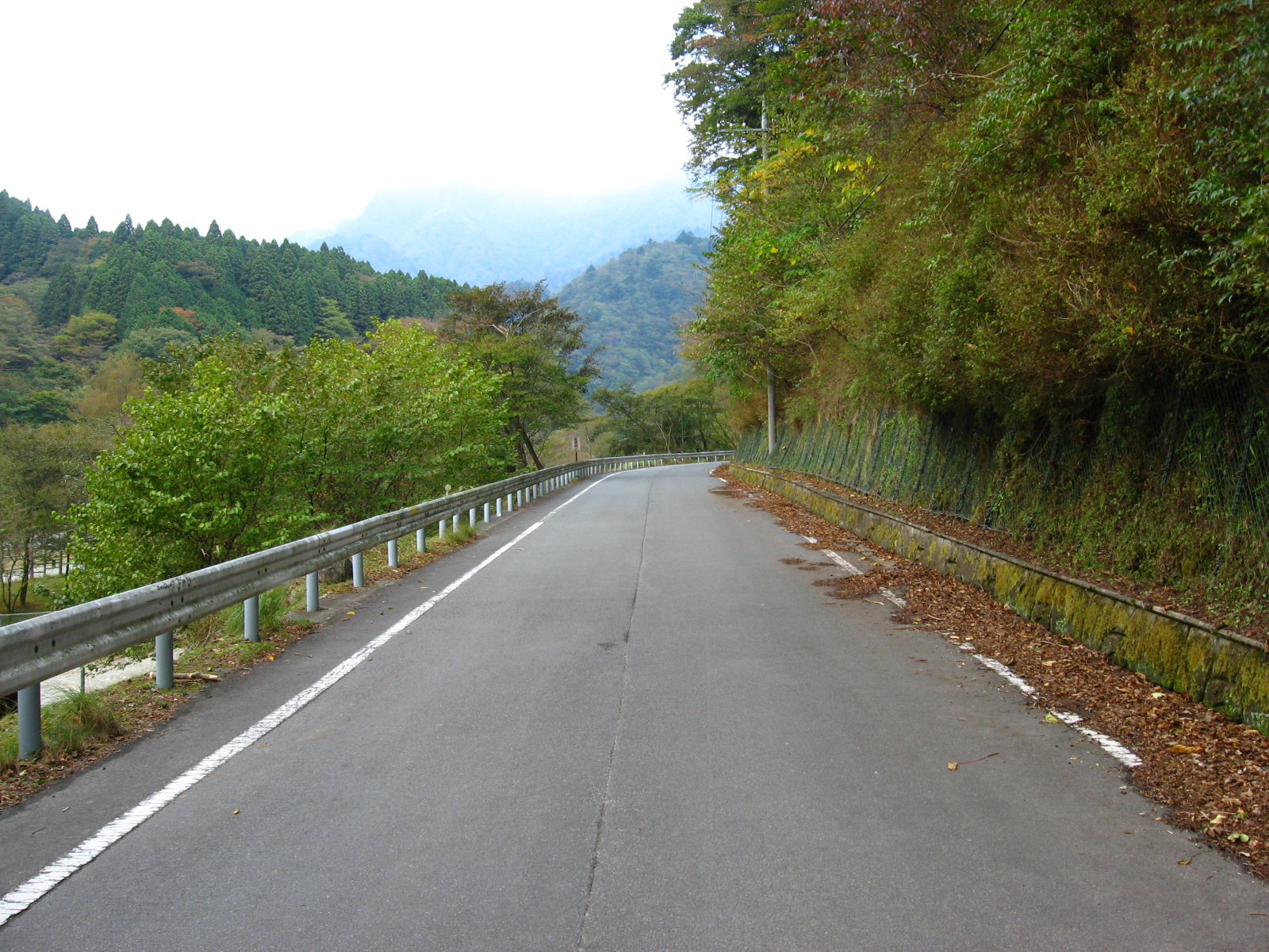 神奈川県道76号